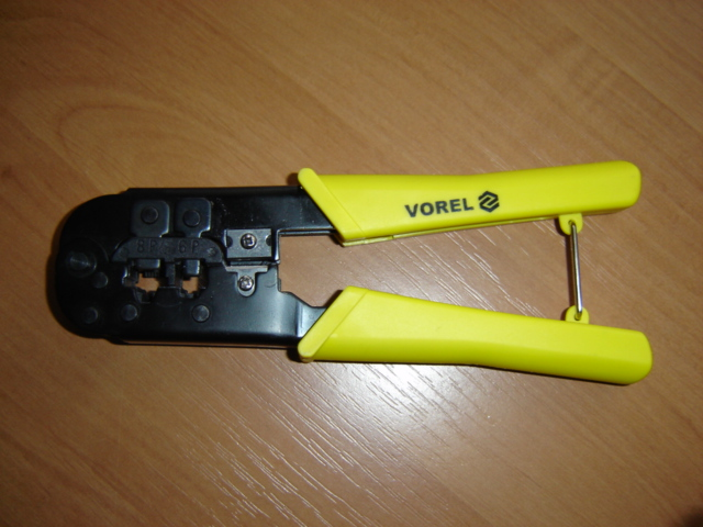 Zaciskarka wtyków Rj-11 i Rj-45